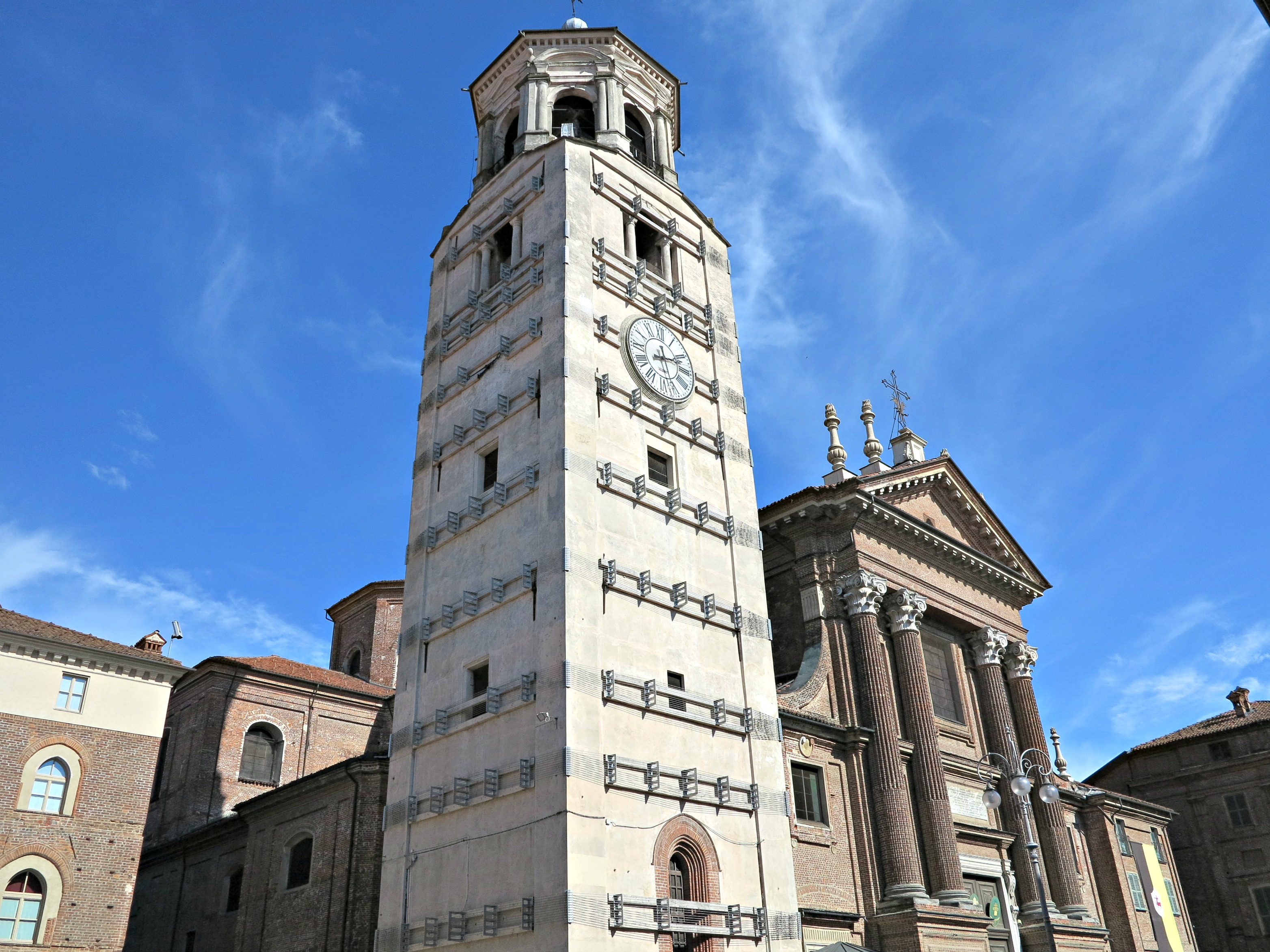 Cattedrale di Fossano (2)